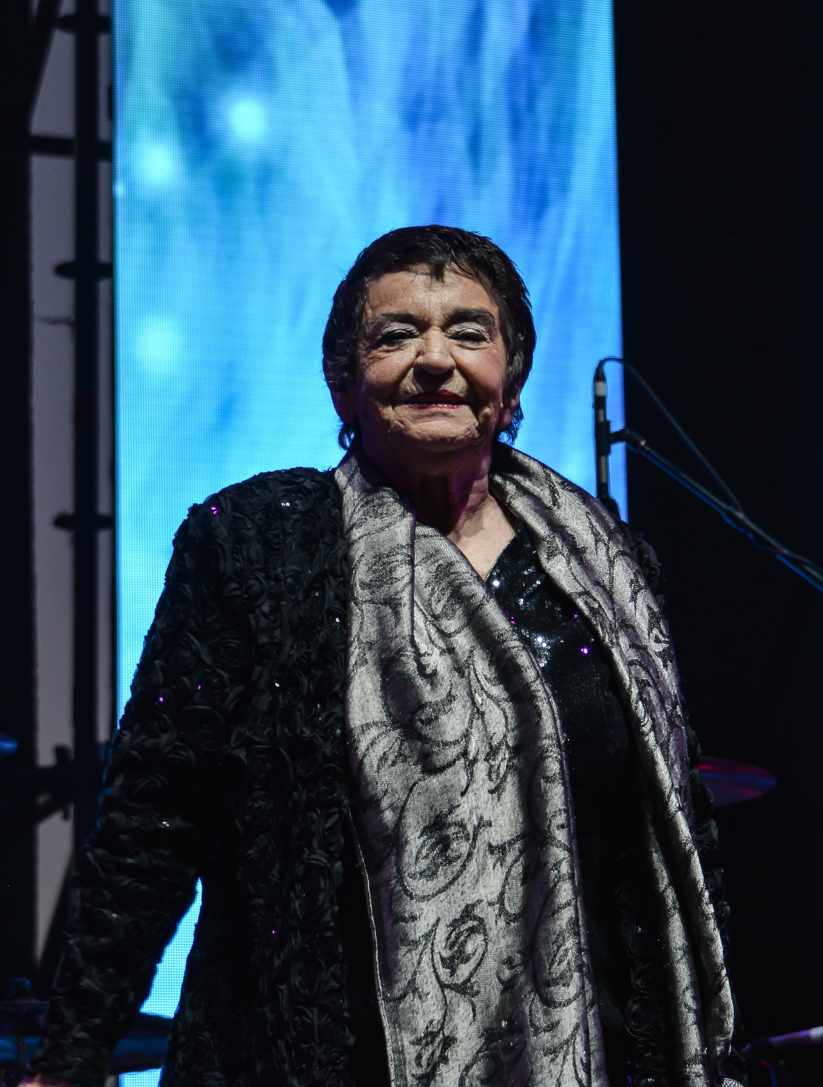 Cecilia en la Cumbre del Rock Chileno 2018, Santiago, Chile